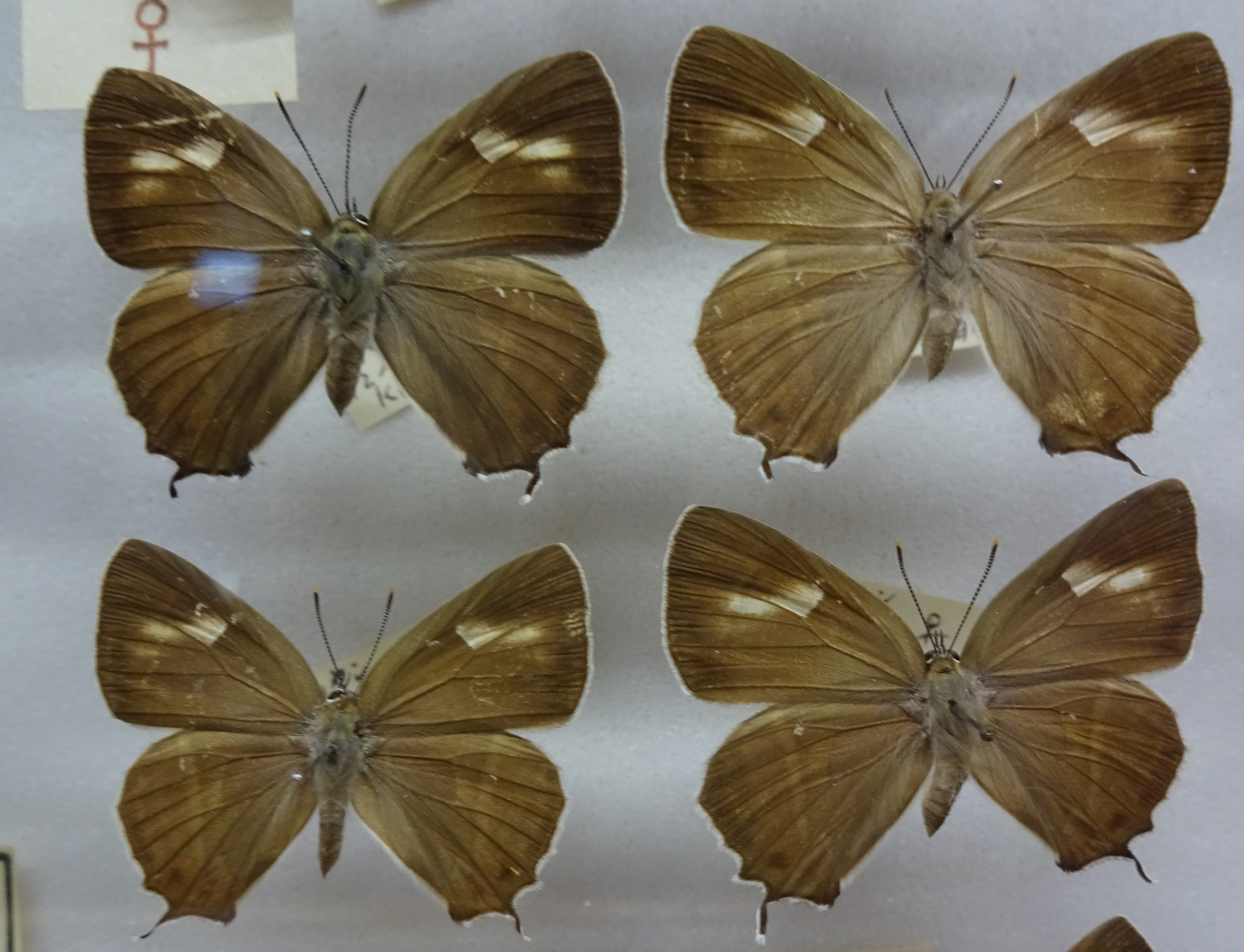 ハヤシミドリシジミ